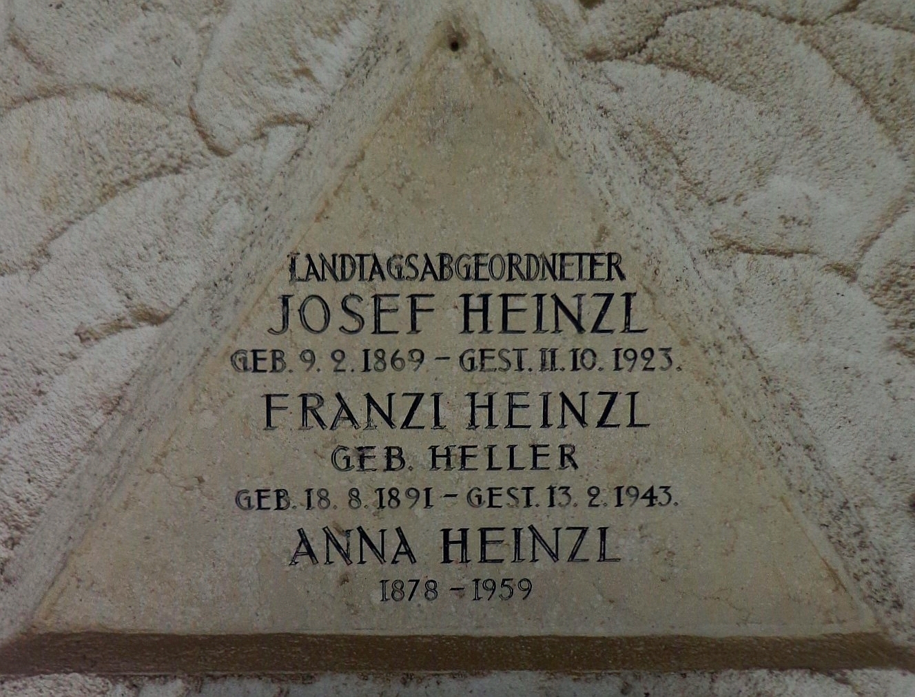 Feuerhalle Simmering - Arkadenhof (Abteilung ARI) - Grab des sozialdemokratischen Gewerkschafters und Politikers Josef Heinzl (1869–1923) mit Bestattung von 1923, dem Jahr der Eröffnung der Feuerhalle Simmering